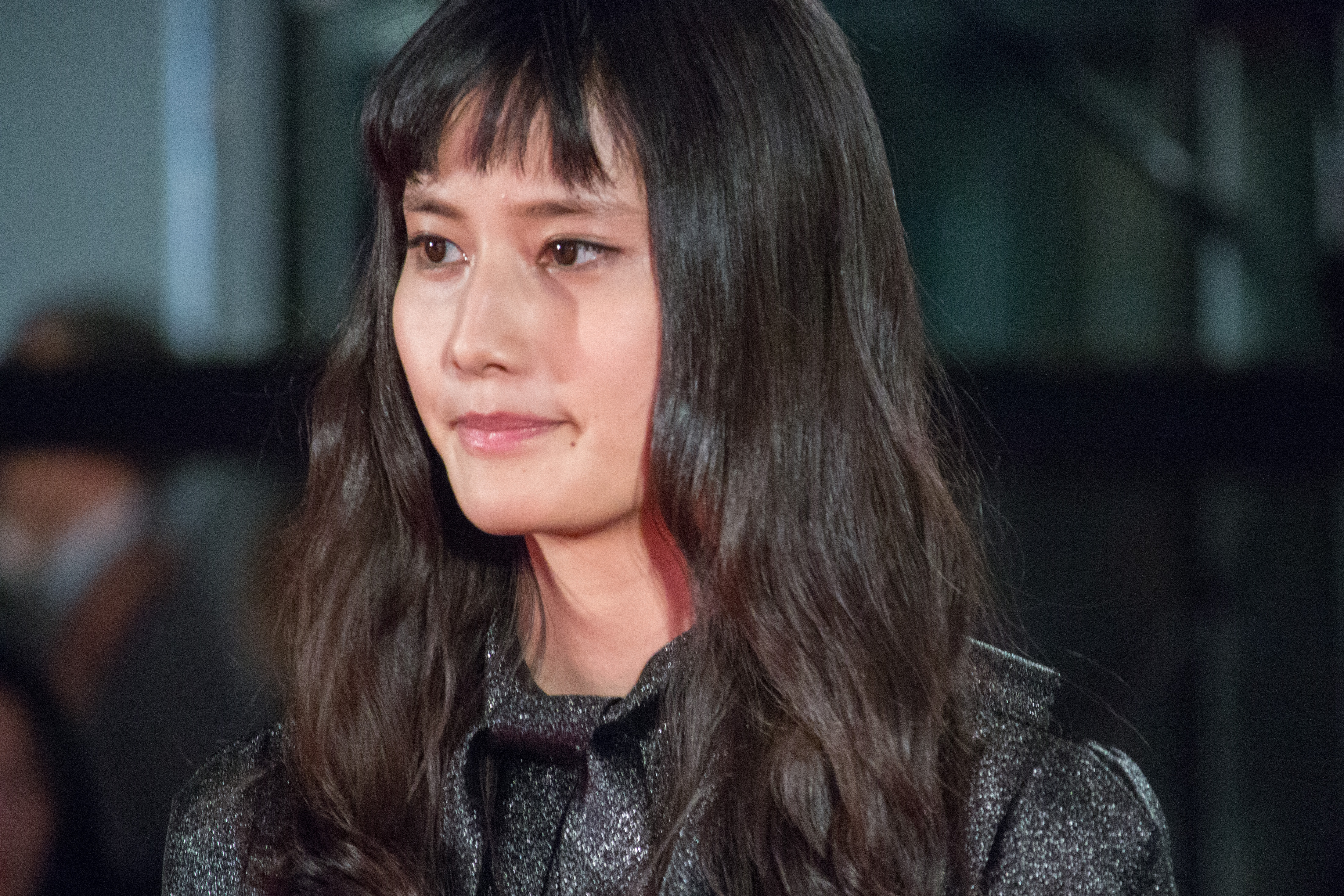 第28回 東京国際映画祭 オープニングセレモニー 橋本愛 (残穢 -住んではいけない部屋-)